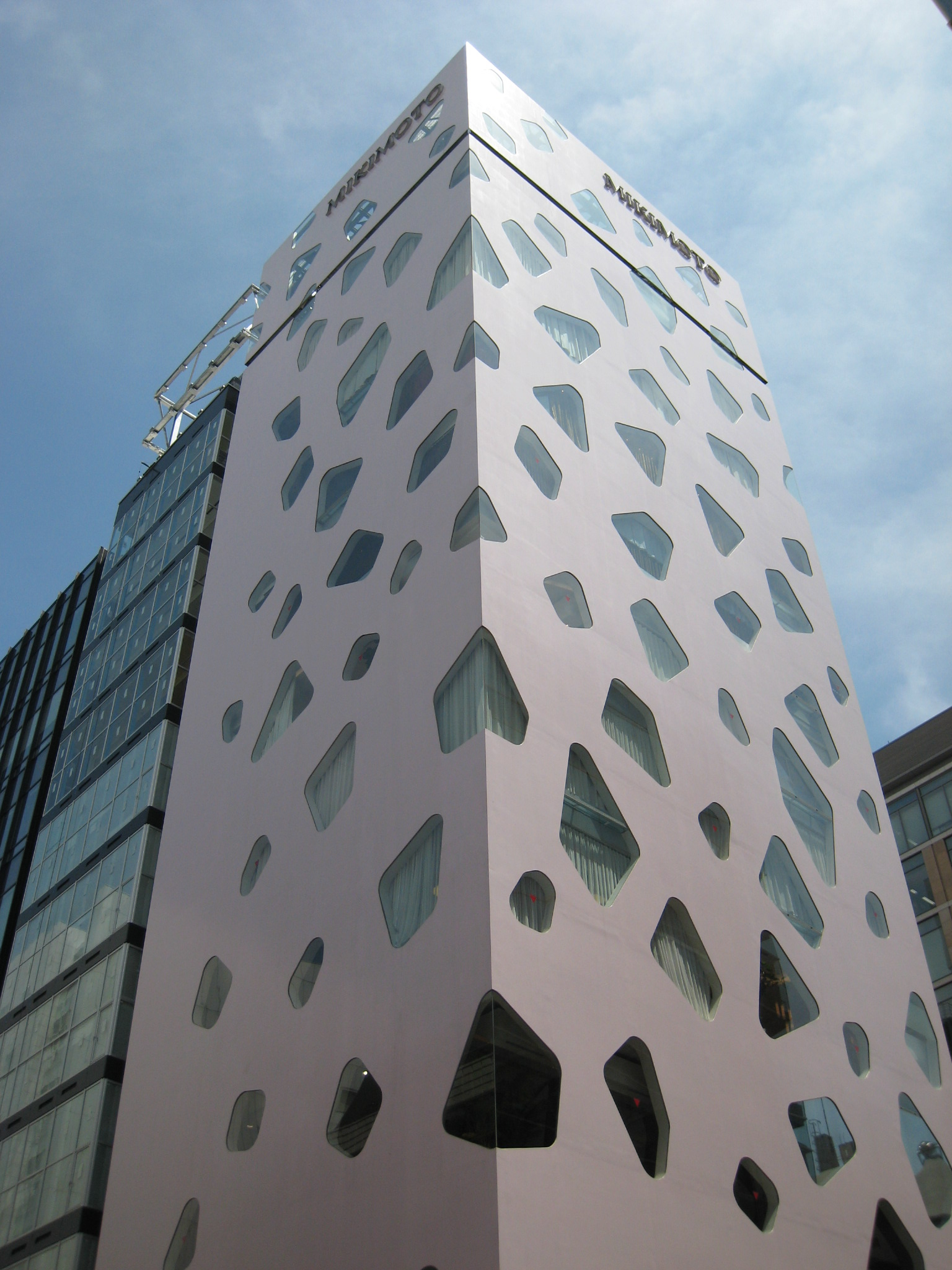 Mikimoto Ginza Building, at Ginza Tokyo Japan, design by Toyo Ito.